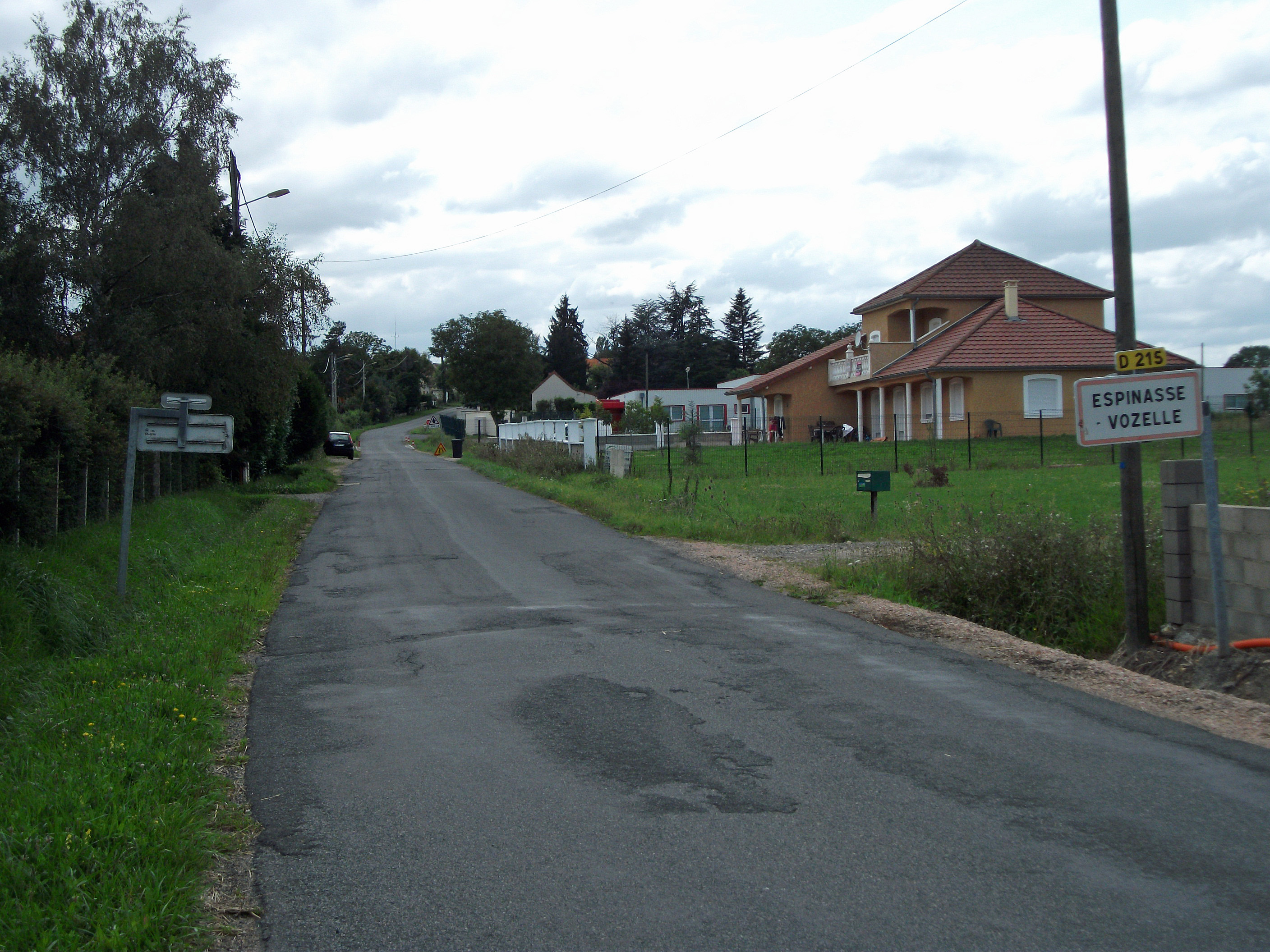 Espinasse-Vozelle : entrée par la route départementale 215 en provenance de Vichy.